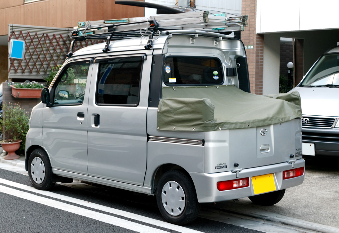 The 10th generation Daihatsu Hijet Deck-van G